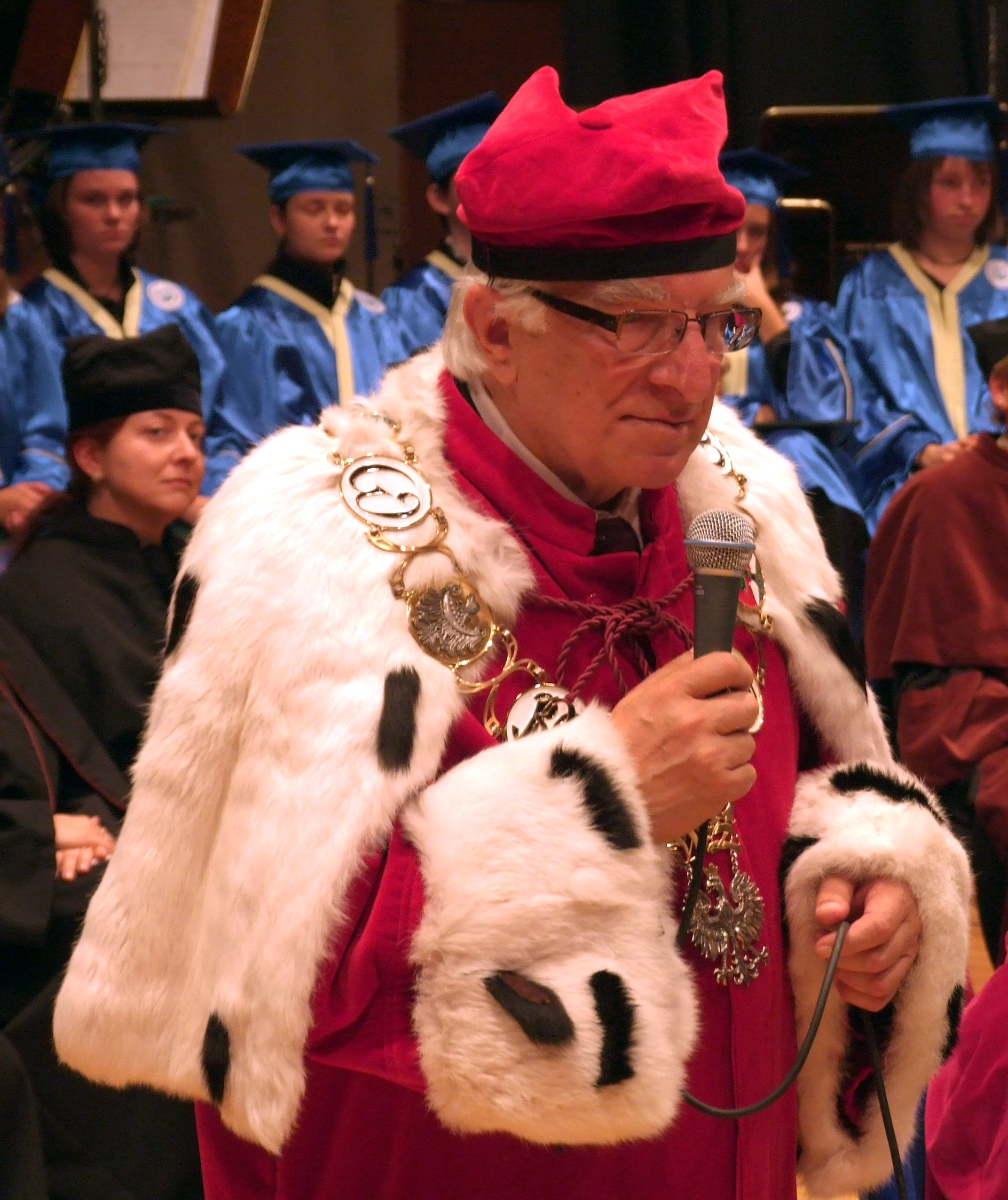 Czesław P. Dutka, rektor Państwowej Wyższej Szkoły Zawodowej im. Angelusa Silesiusa w Wałbrzychu. Filharmonia Sudecka, Wałbrzych.